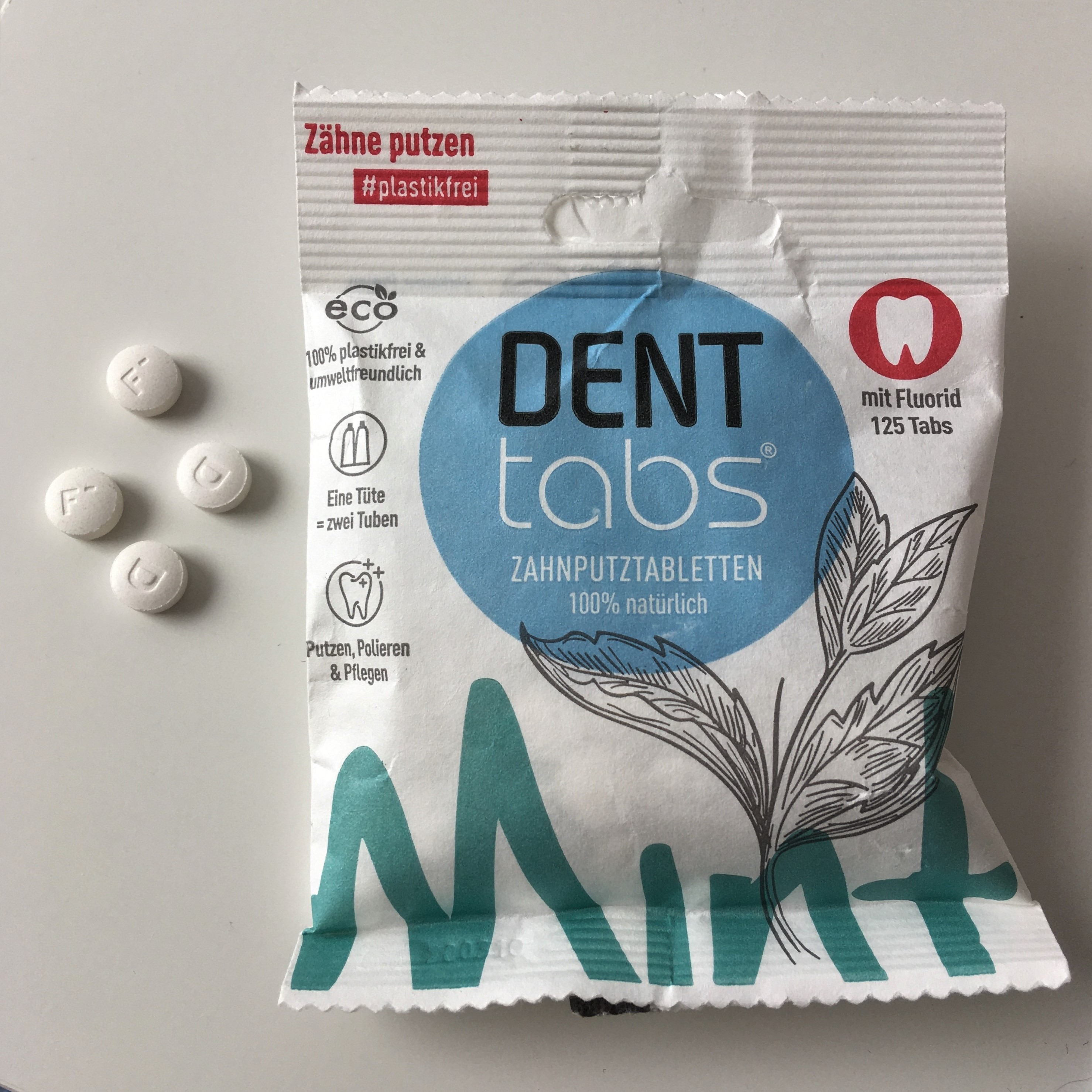 Zahnputztablette